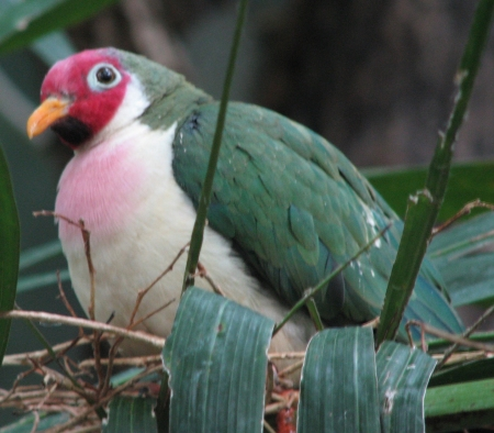 Jambu Fruit Dove